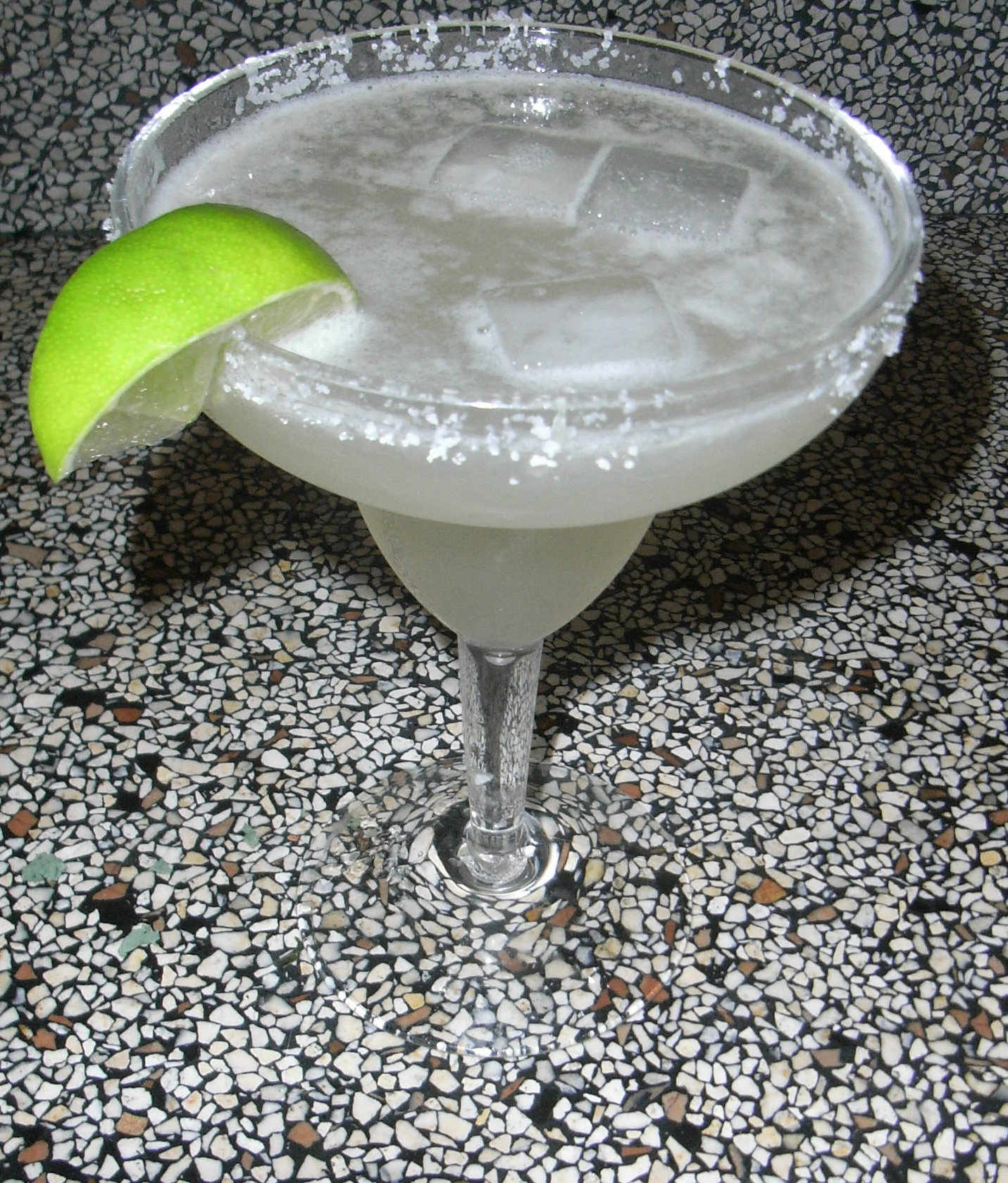 Margarita cocktail